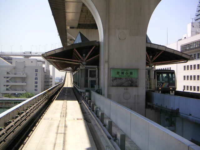 新交通ゆりかもめ 芝浦ふ頭駅 (東京都港区海岸三丁目)